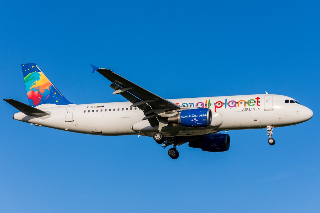 Small Planet Airlines Airbus A320-214 LY-SPH @VNO